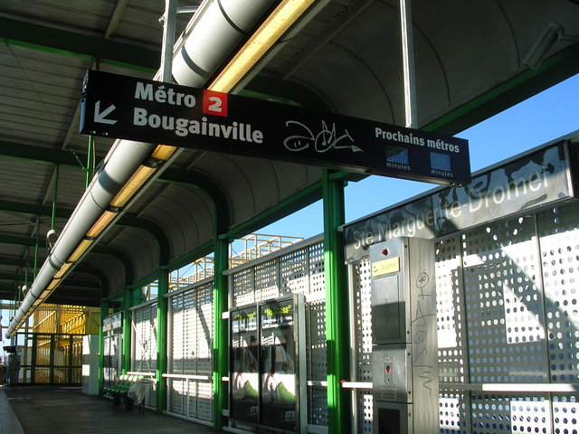 Station "Sainte-Marguerite Dromel" de la ligne 2 du métro de Marseille.